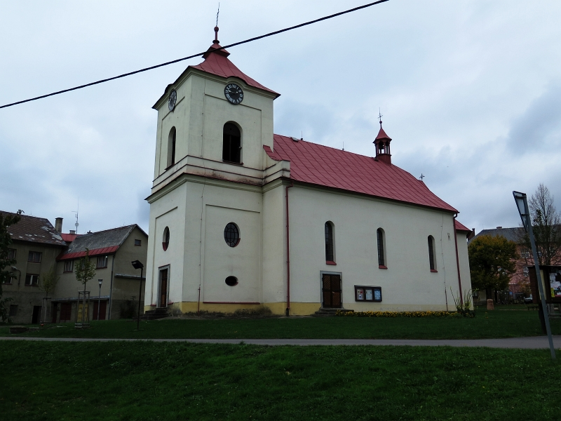 Kostel svatého Jakuba, Poniklá.